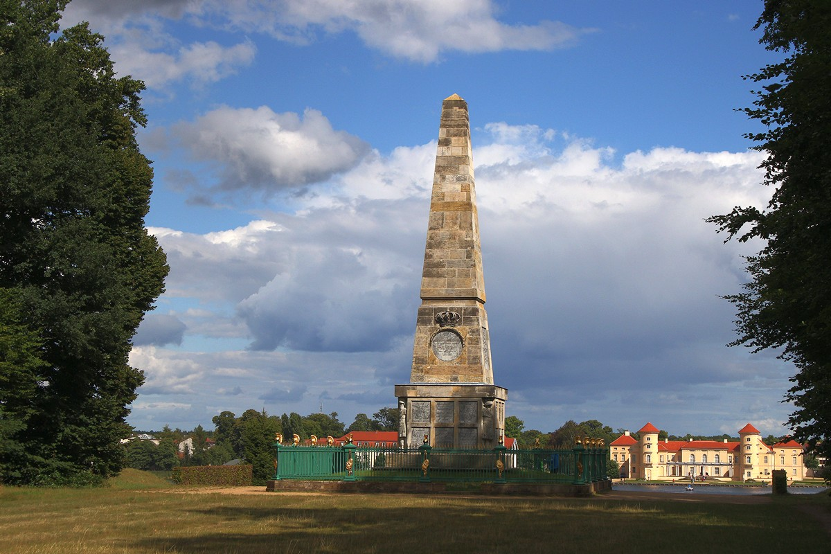 Heldendenkmal in Rheinsberg. Nach Ansicht von Heinrich von Preußen (1726–1802) ehrt es diejenigen Helden, die von Friedrich II. nicht gebührend gewürdigt worden sind.